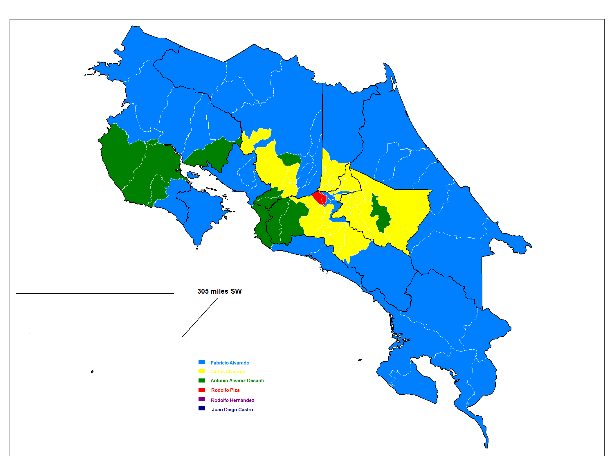 Resultados por cantón de la primera ronda de las elecciones presidenciales de Costa Rica. 4 de febrero